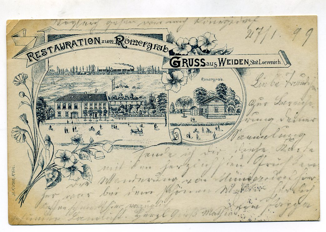 Gruss aus Weiden Stat.Loevenich -1899 Restauration zum Römergrab -Römergrab